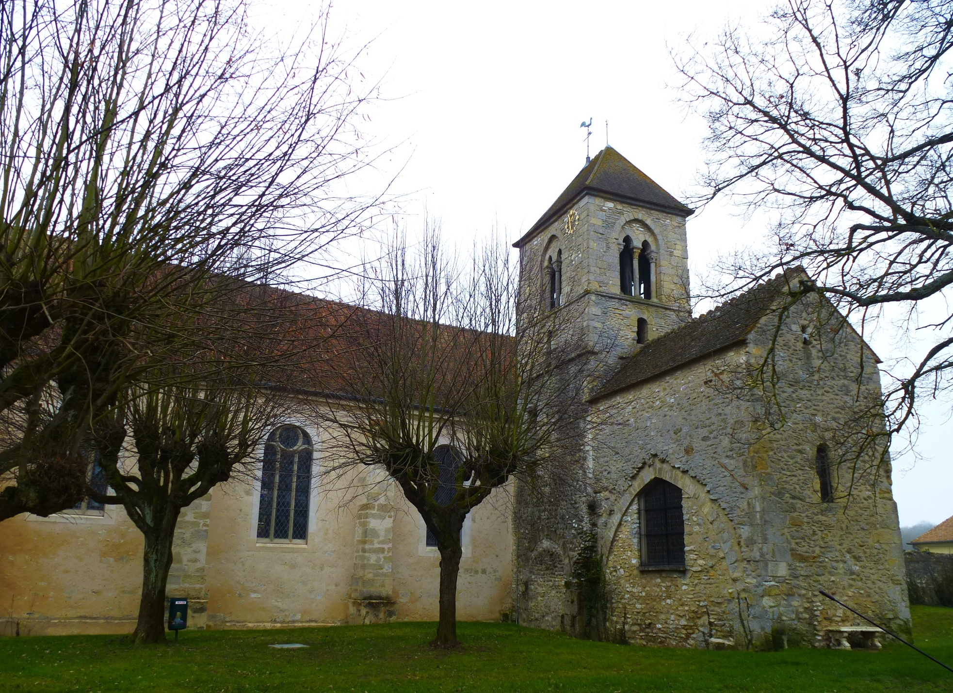 Église Saint-Martin de Follainville-Dennemont. (Yvelines, région Île-de-France).